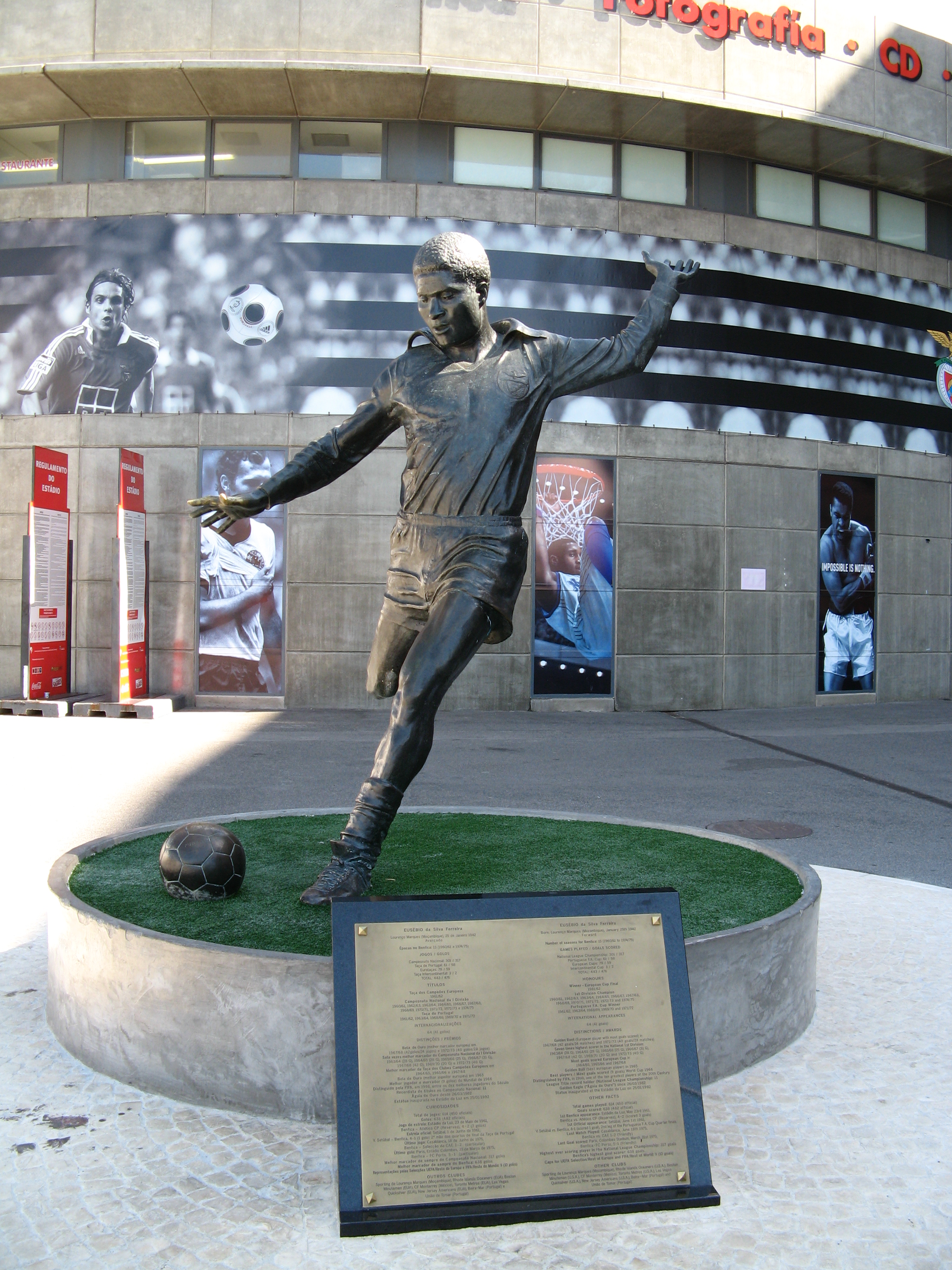 Escultura do futebolista Eusébio da Silva Ferreira, na Praça Centenarium junto ao Estádio do Sport Lisboa e Benfica (Lisboa, Portugal).